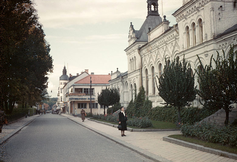 Lindesbergs tingshus, invigt 1895. Ritades av den kände arkitekten Theodor Dahl. Numera är byggnaden hyreshus.